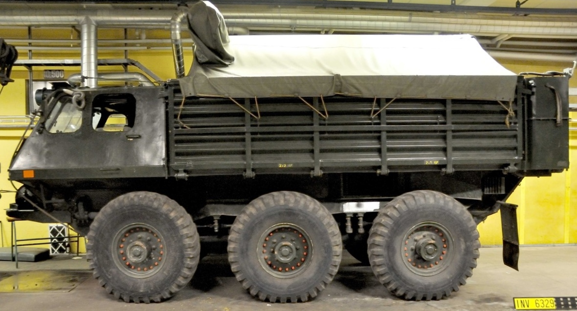 Amfibiebil 101 (M5198-101022) eller Alvis Stalwart köptes in till Sverige år 1962 som försöksfordon, som underhållsfordon till kustjägarebataljonerna. År 1969 övergick fordonet till rörlig spärrbataljon där den drog mätstation Arte 719. År 1985 utgick fordonet ur krigsorganisationen. Just detta fordon är tillverkat 1968 och är en Amfibiebil 101B med milregnr: 41123, och har tjänstgjort vid Norrlands kustartilleriförsvar. Fordonet fanns även i versionen Amfibiebil 101C.